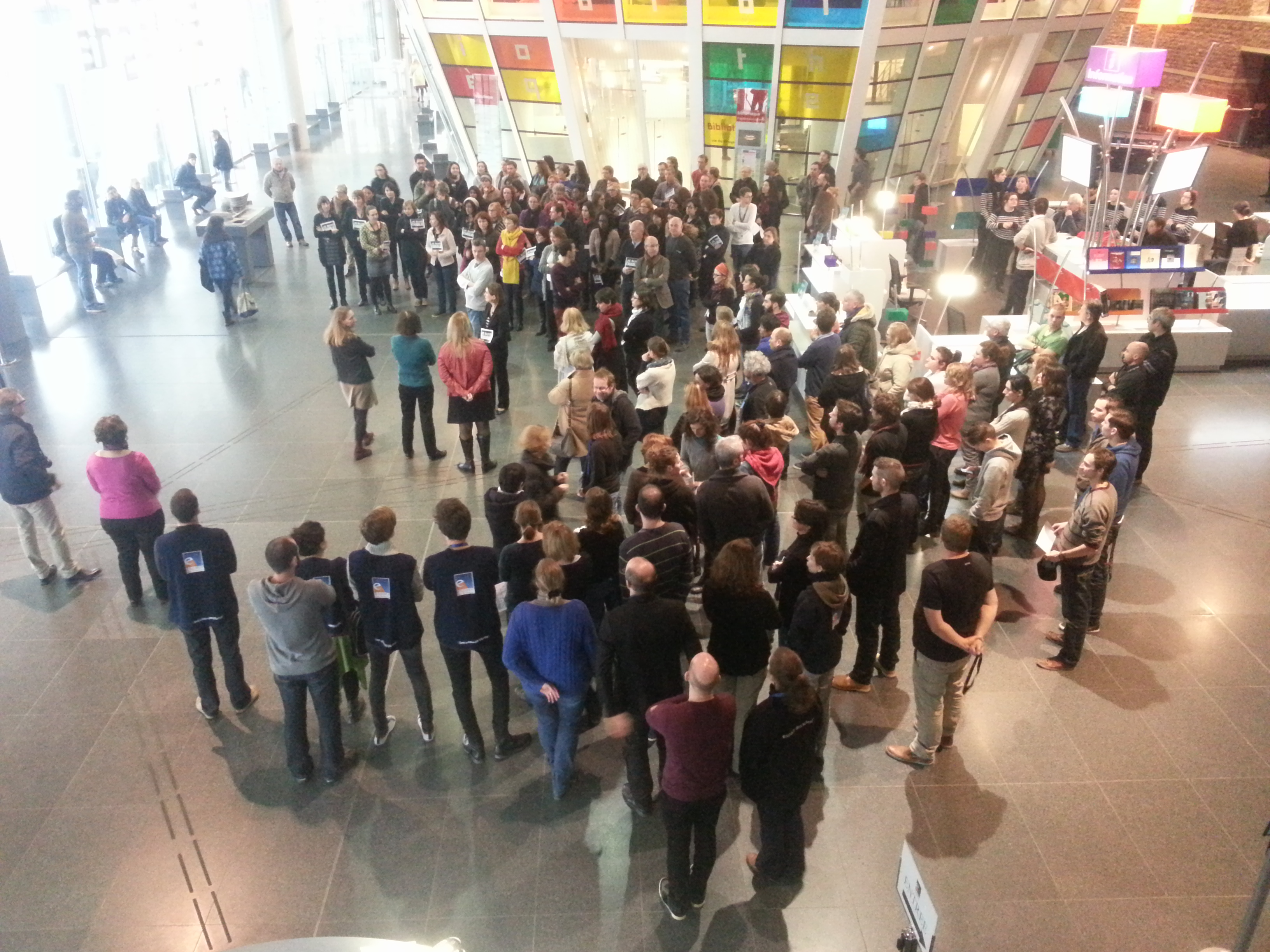 8 janvier 2015 - Minute de silence aux Champs Libres suite à l'attentat à Charlie Hebdo contre la liberté d'expression